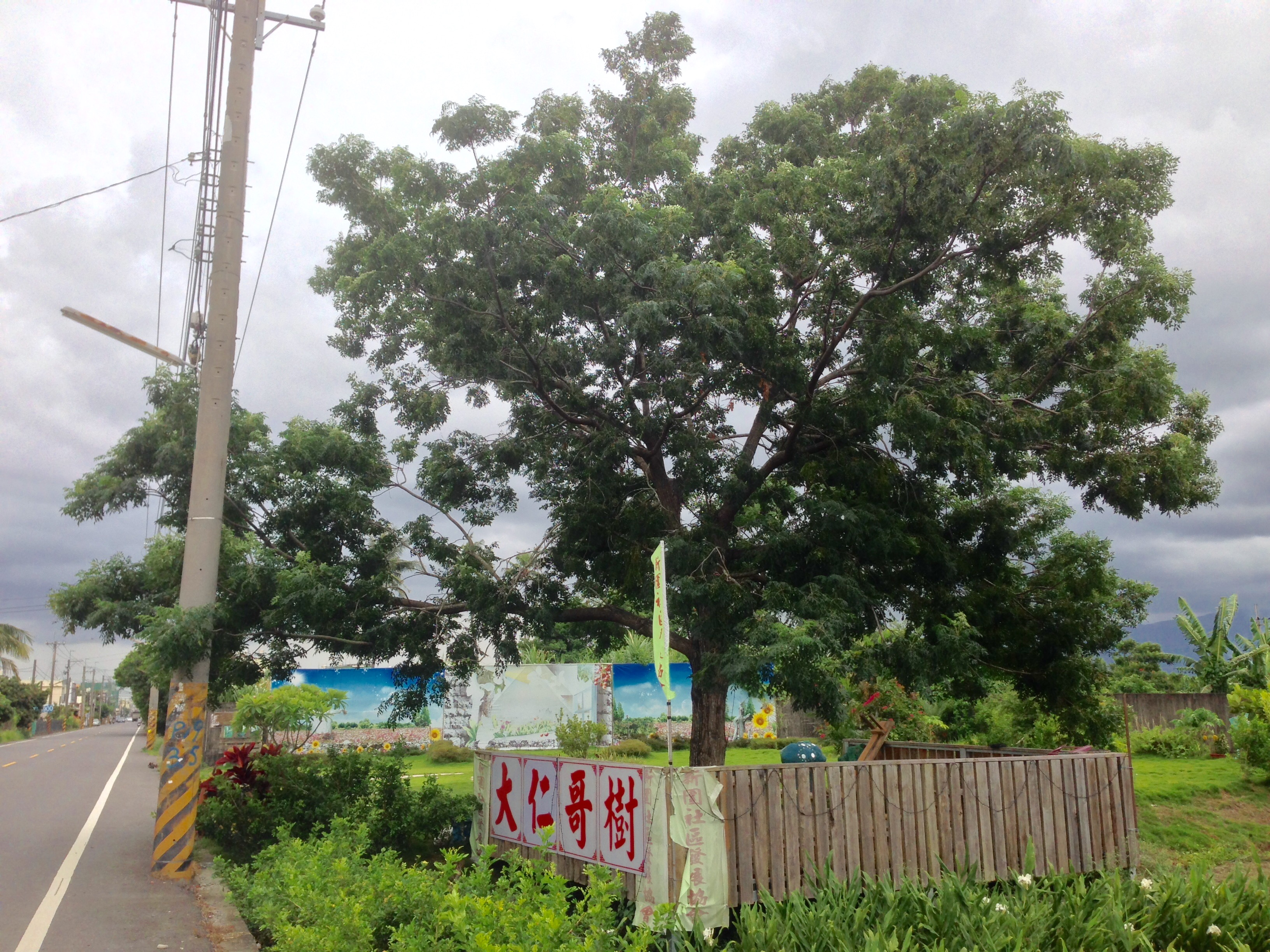 位在鹽埔鄉新圍社區德協路旁，被稱為大仁哥樹的苦楝樹。